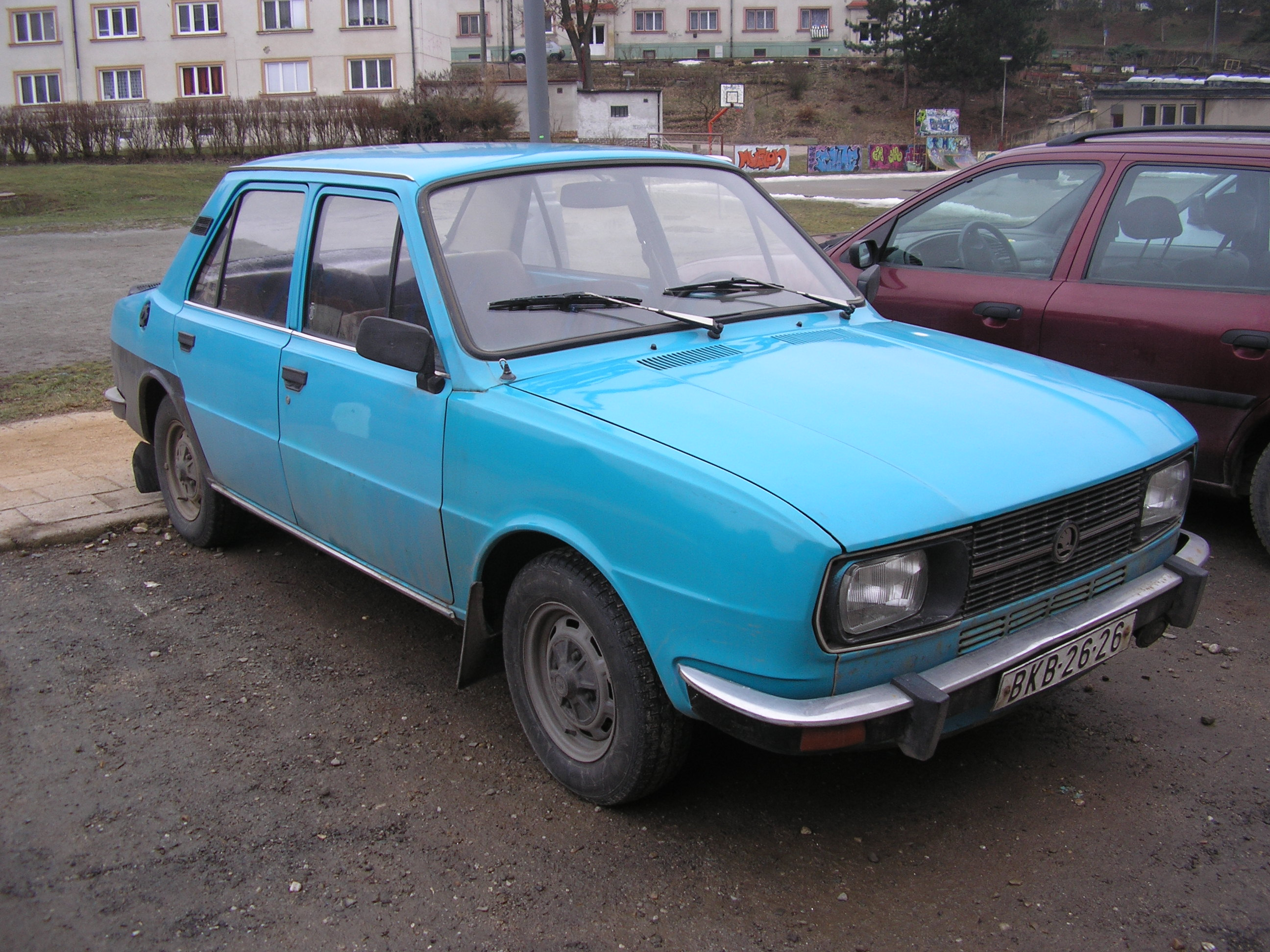 Skoda 120L